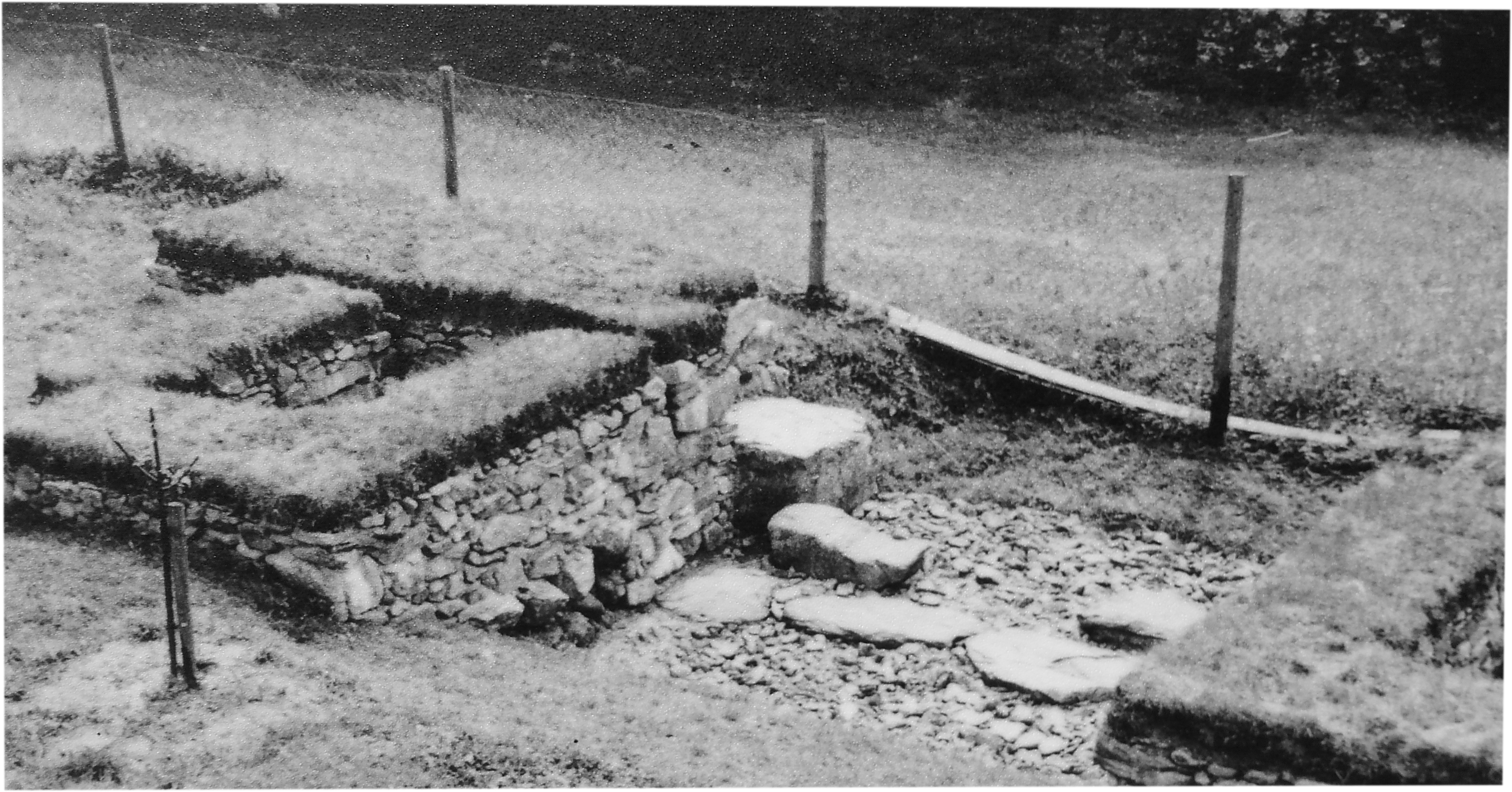 Westtor des Kastell Schlögen (Ioviacum) um 1957.